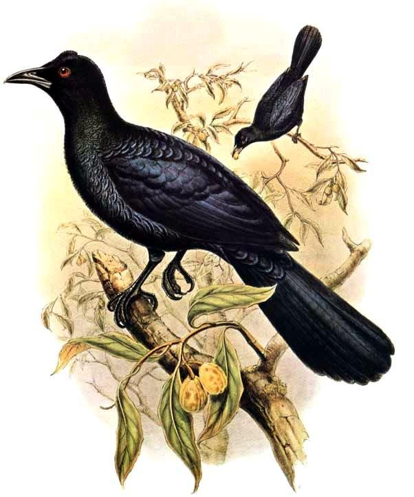 Manucodia chalybata